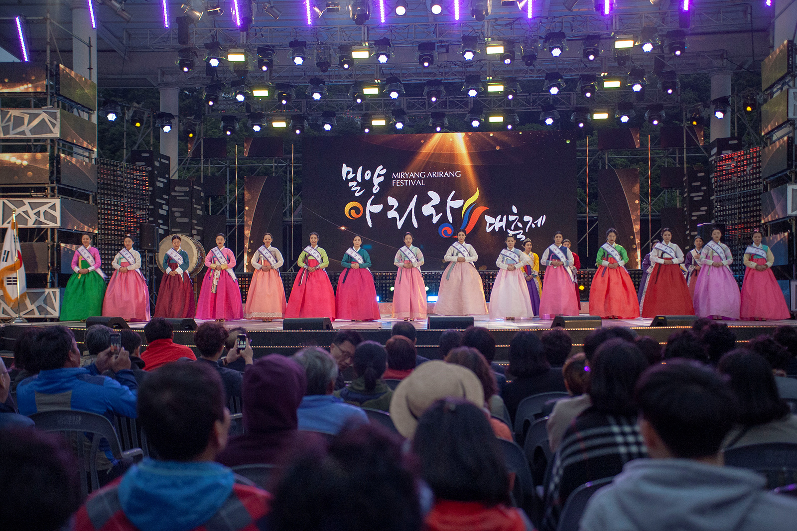 아랑전설의 전통을 계승한 아랑 낭자 선발전의 모습